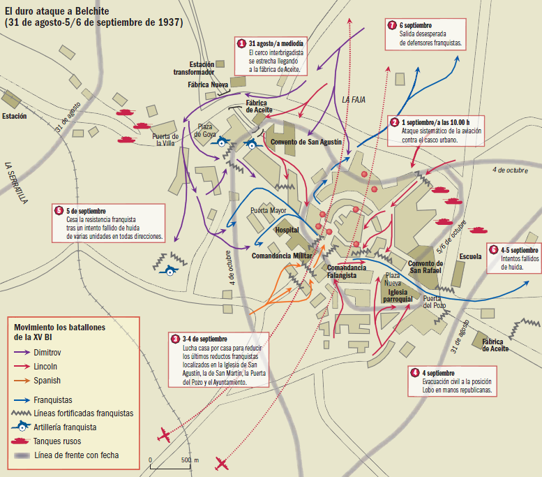 Fragmento de la página 50 del libro "Las Brigadas Internacionales", de Víctor Hurtado y José Luis Martín Ramos (DAU, 2013). El mapa recrea el asalto republicano a Belchite en agosto-septiembre de 1937.